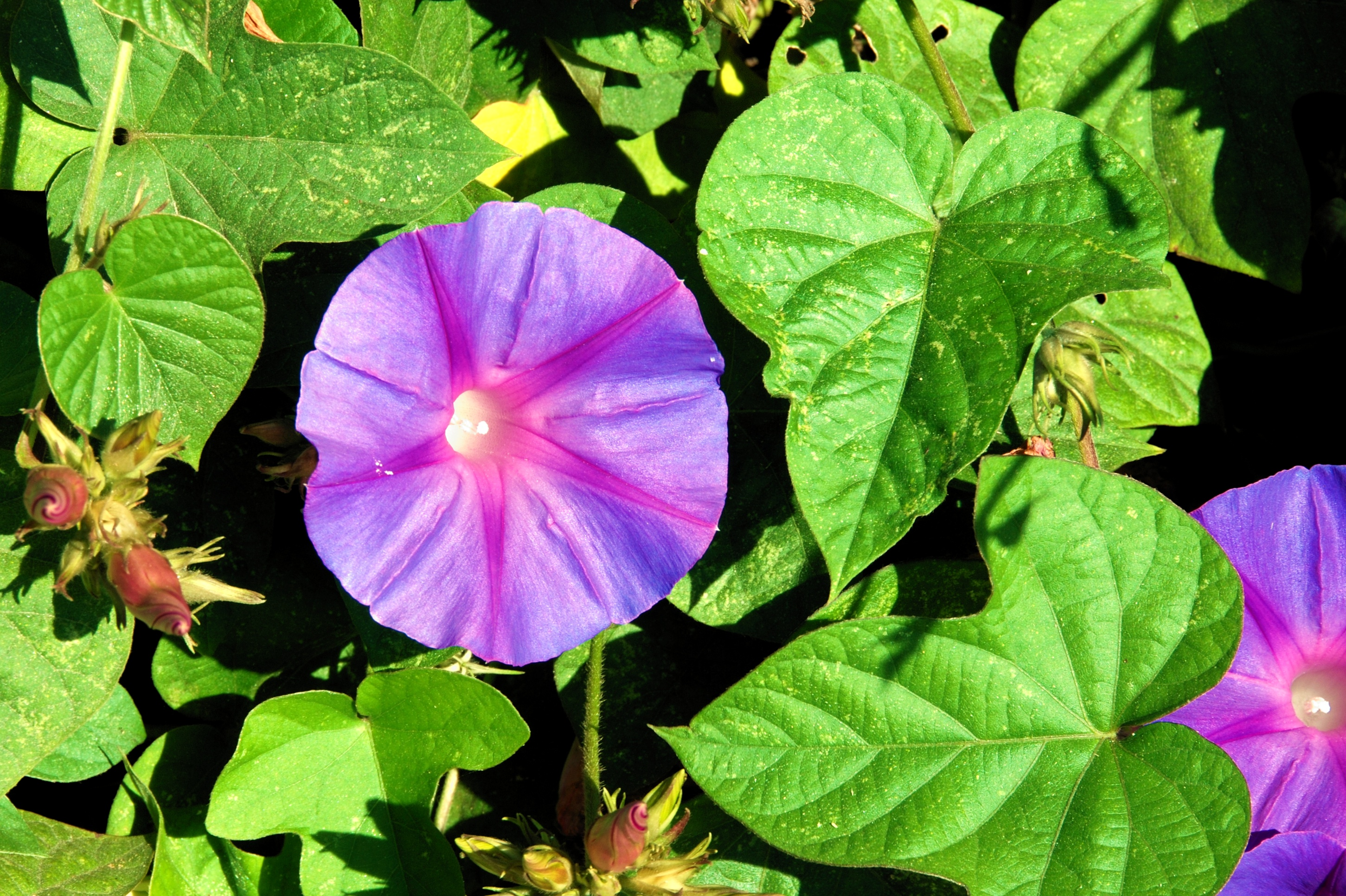 Morning Glory (Ipomoea acuminata). Porto Covo, Portugal.